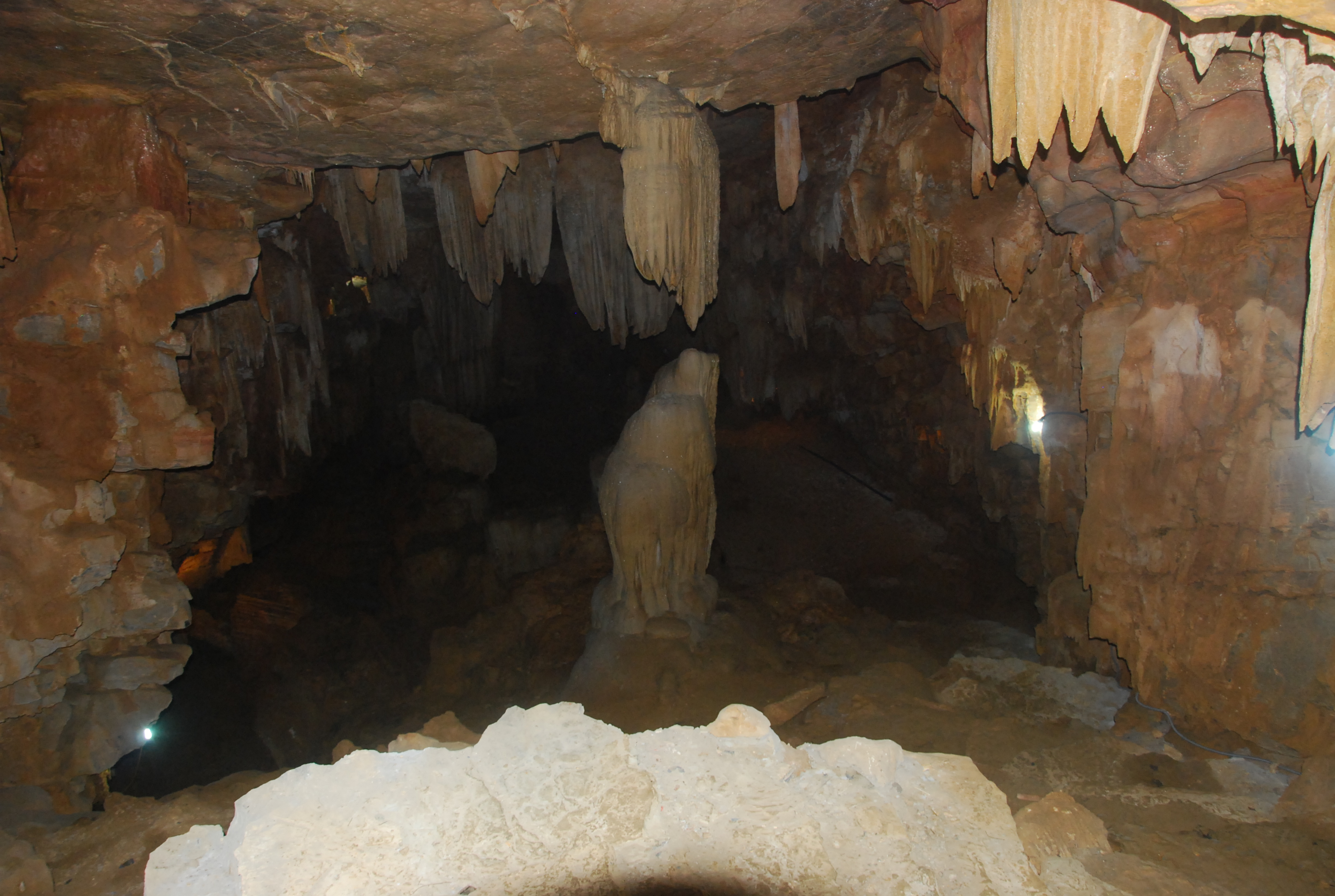 Động Vái Giời thuộc Thung Nham trong Quần thể di sản thế giới Tràng An